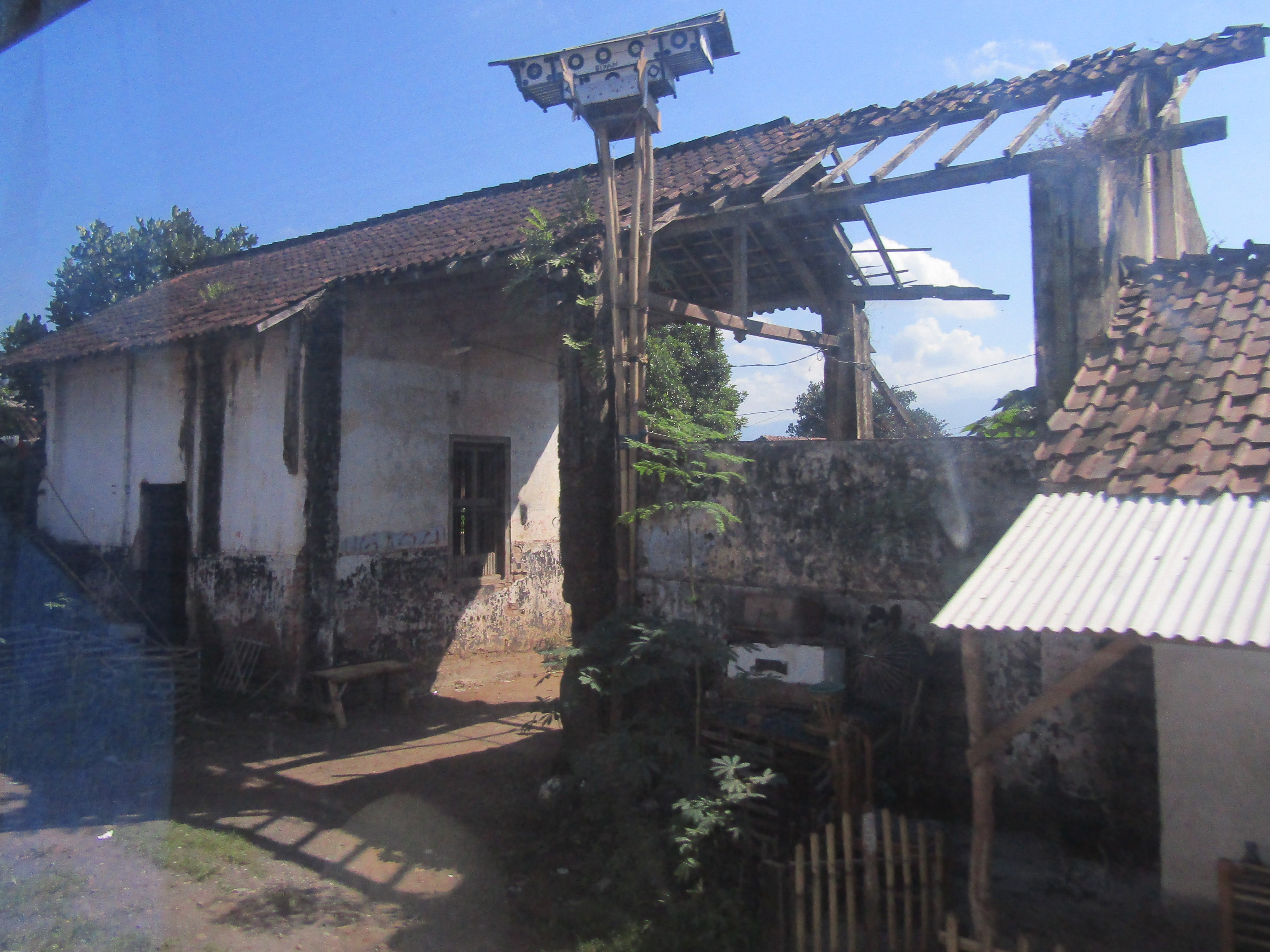 Stasiun nonaktif Petung, terletak di Desa Petung, Kecamatan Rambipuji, Kabupaten Jember.